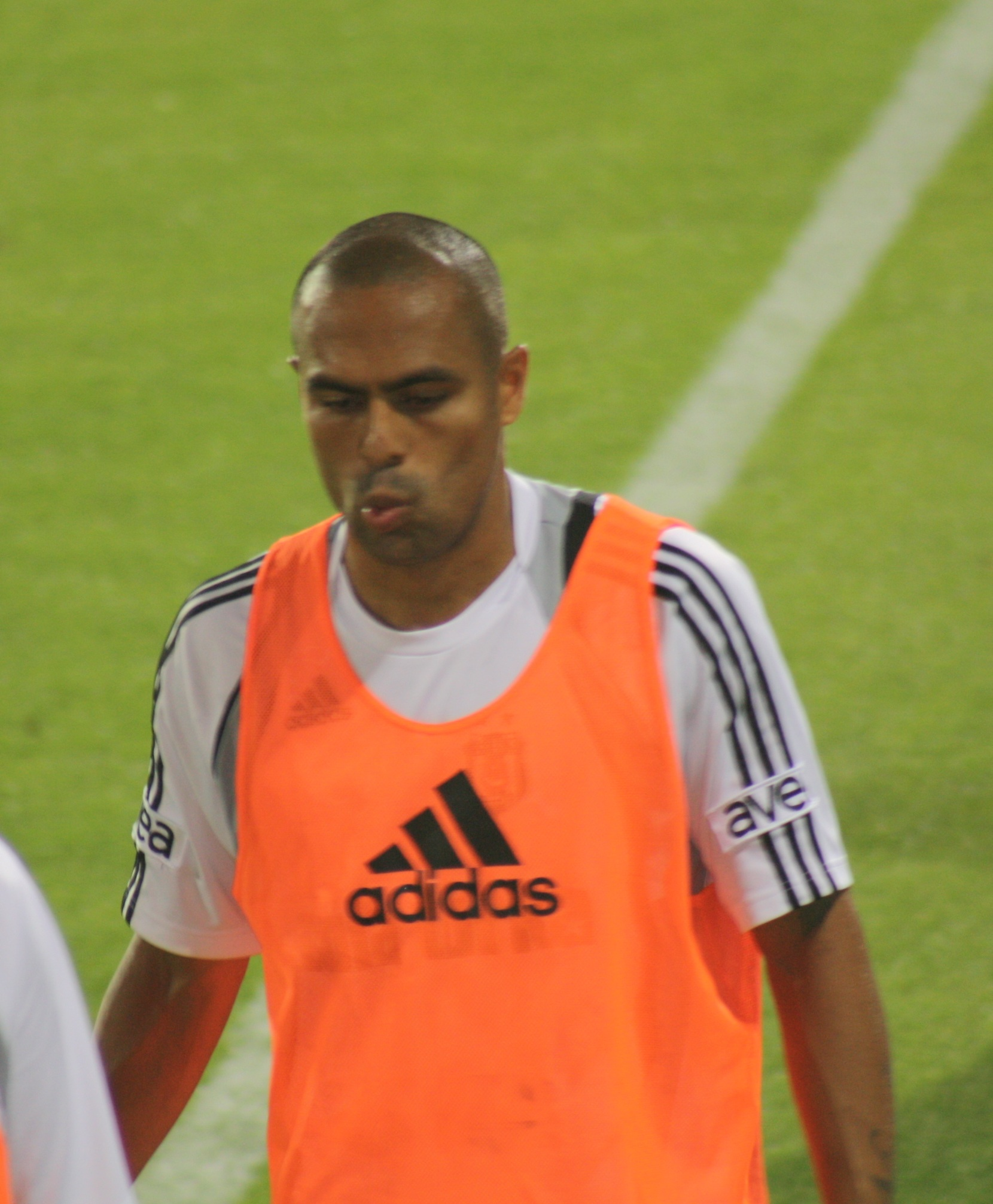 Mert Nobre 2009